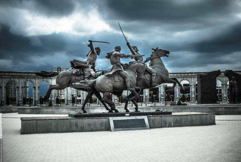 Мемориал памяти и славы в Назрани. Памятник Ингушскому конному полку "Дикой Дивизии".